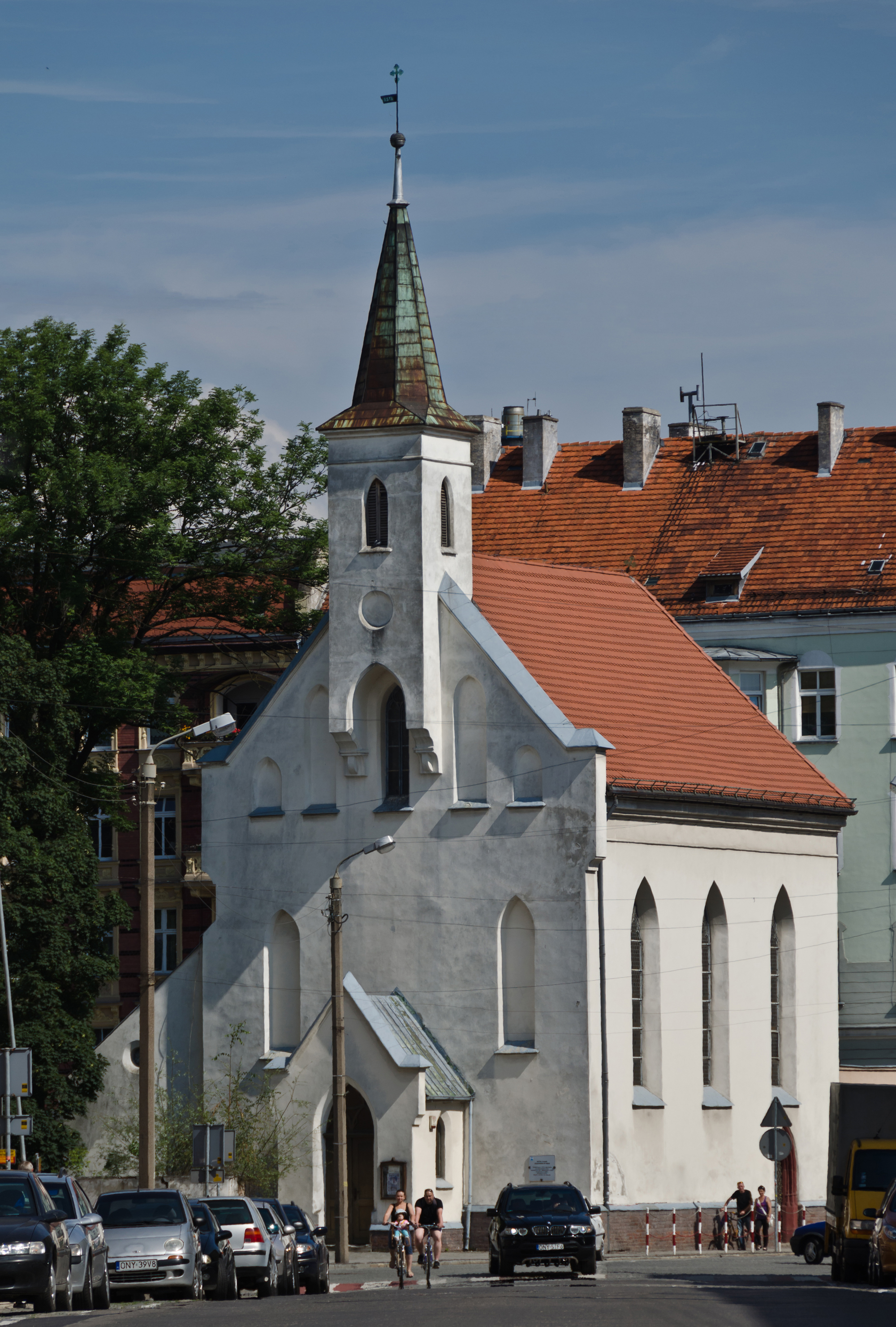 Nysa, kościół fil. p.w. Zwiastowania NMP, 2 poł. XIV, 1885